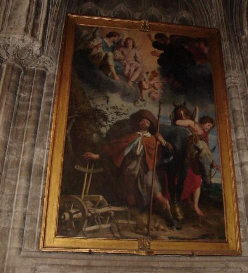 Saint Guidon